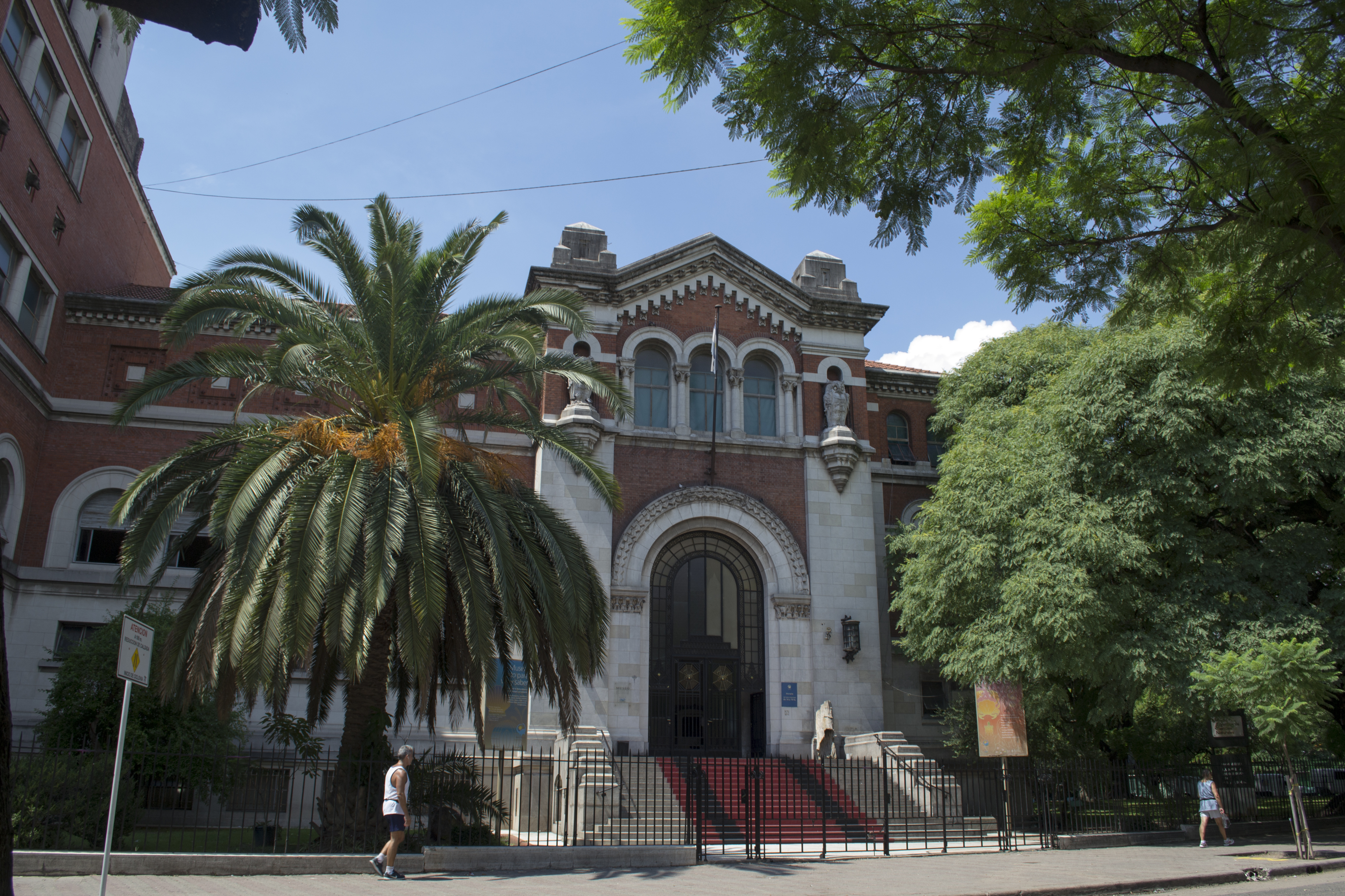 Puerta principal del Museo Argentino de Ciencias Naturales "Bernardino Rivadavia".